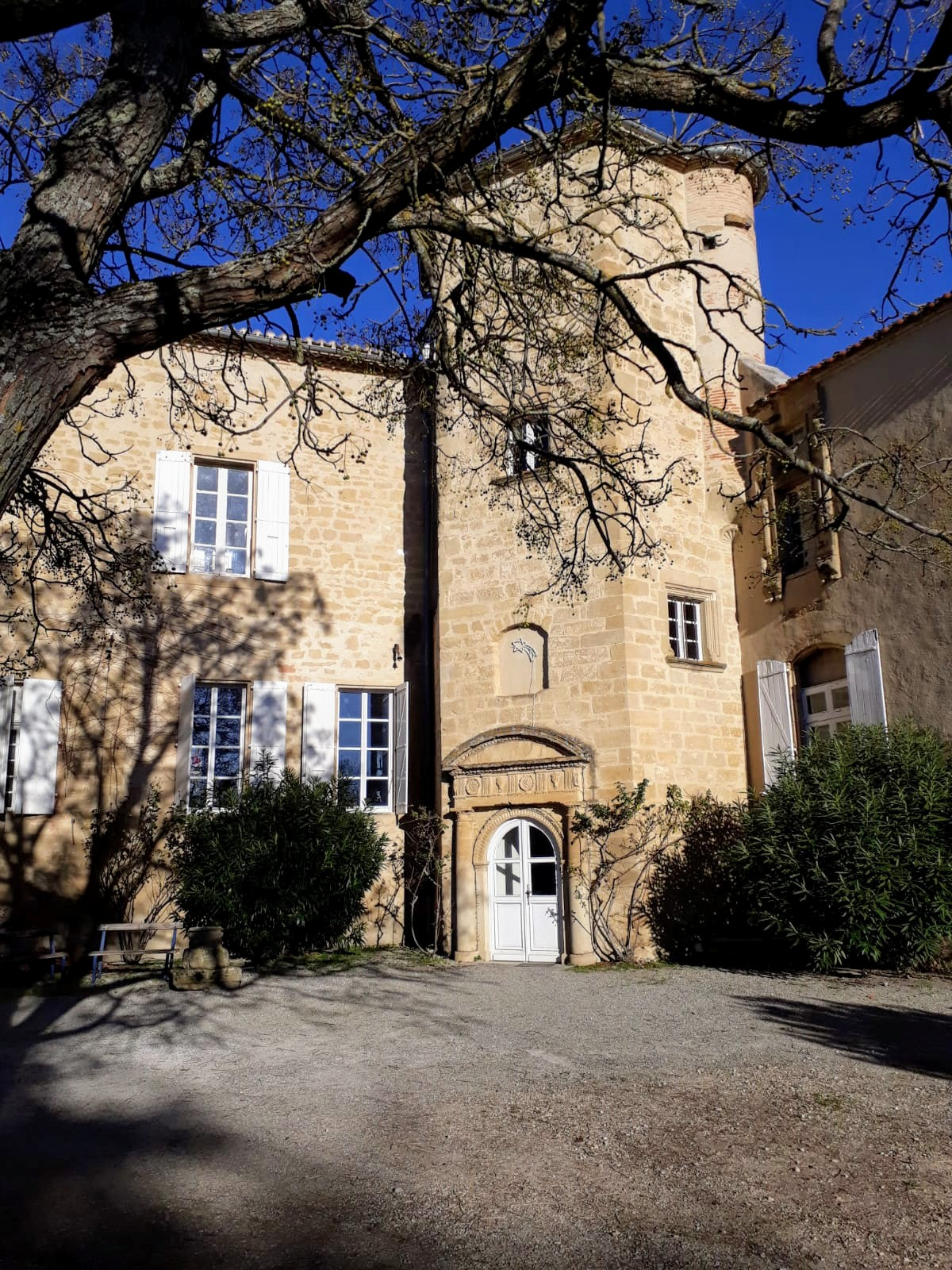 Façade Nord-Est du château d'Airoux